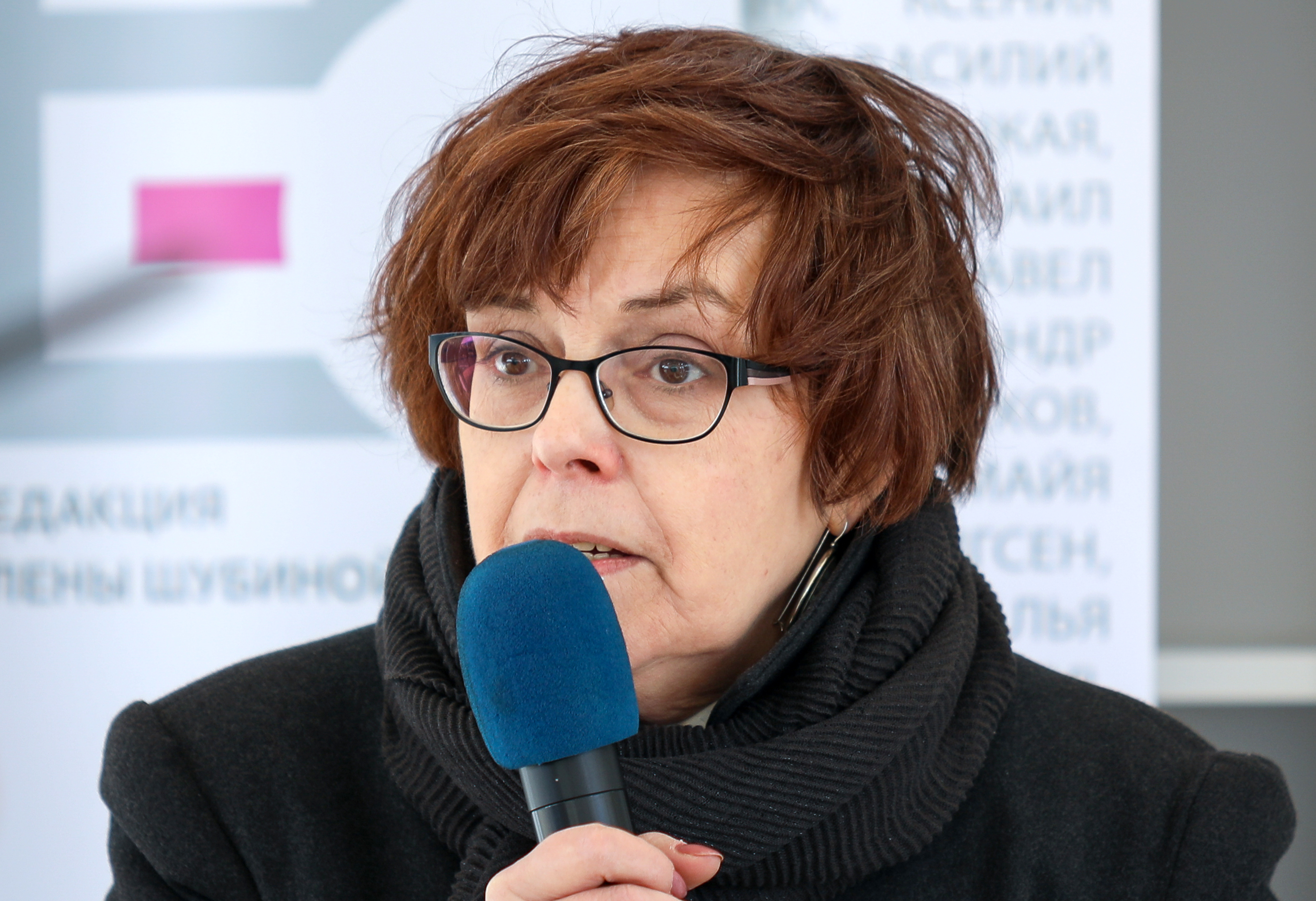 Елена Чижова (писатель) на книжном фестивале "Красная площадь"-2017.